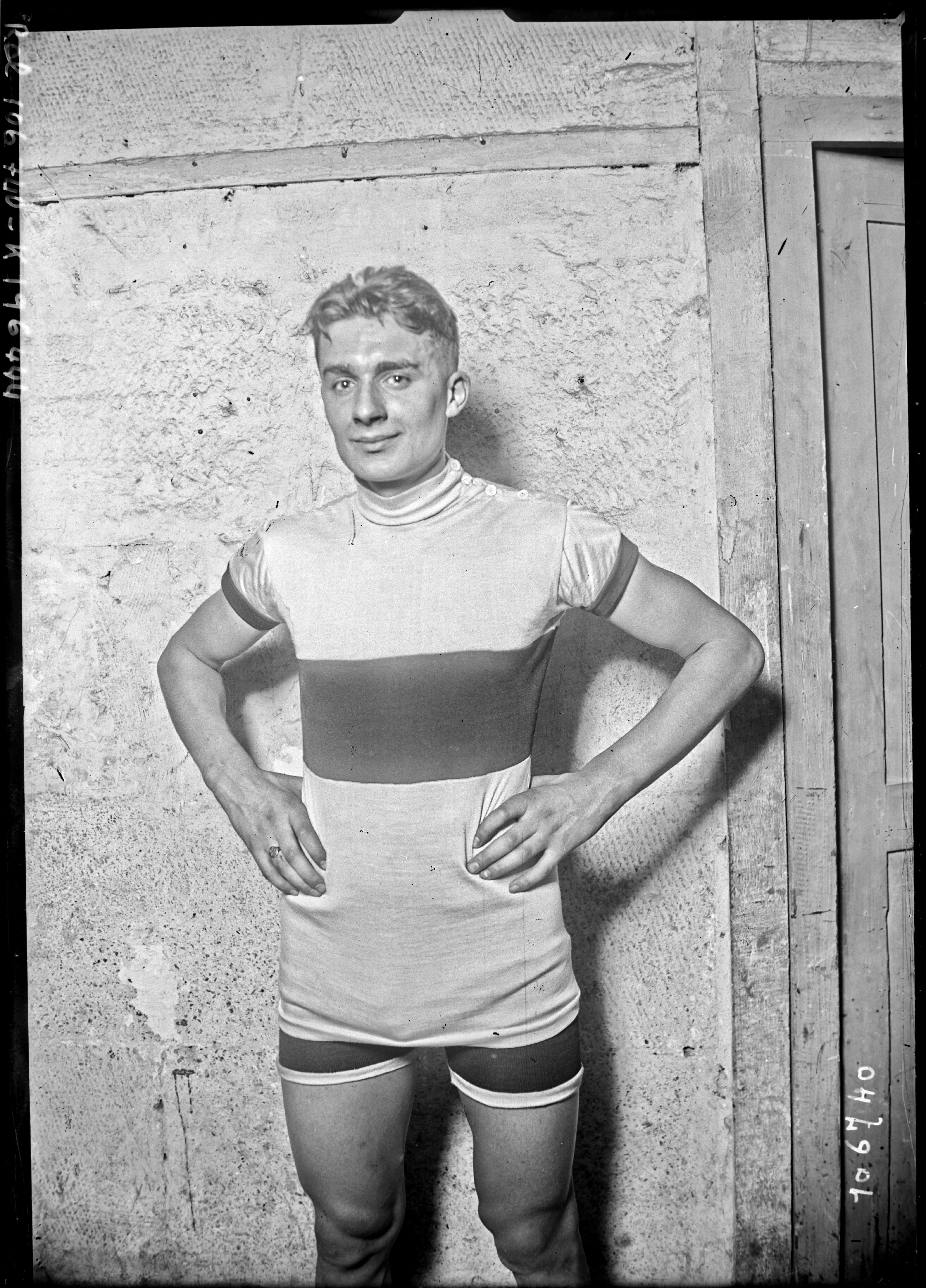 Photographie d'Armand Blanchonnet au Vélodrome d'Hiver le 24 janvier 1926.